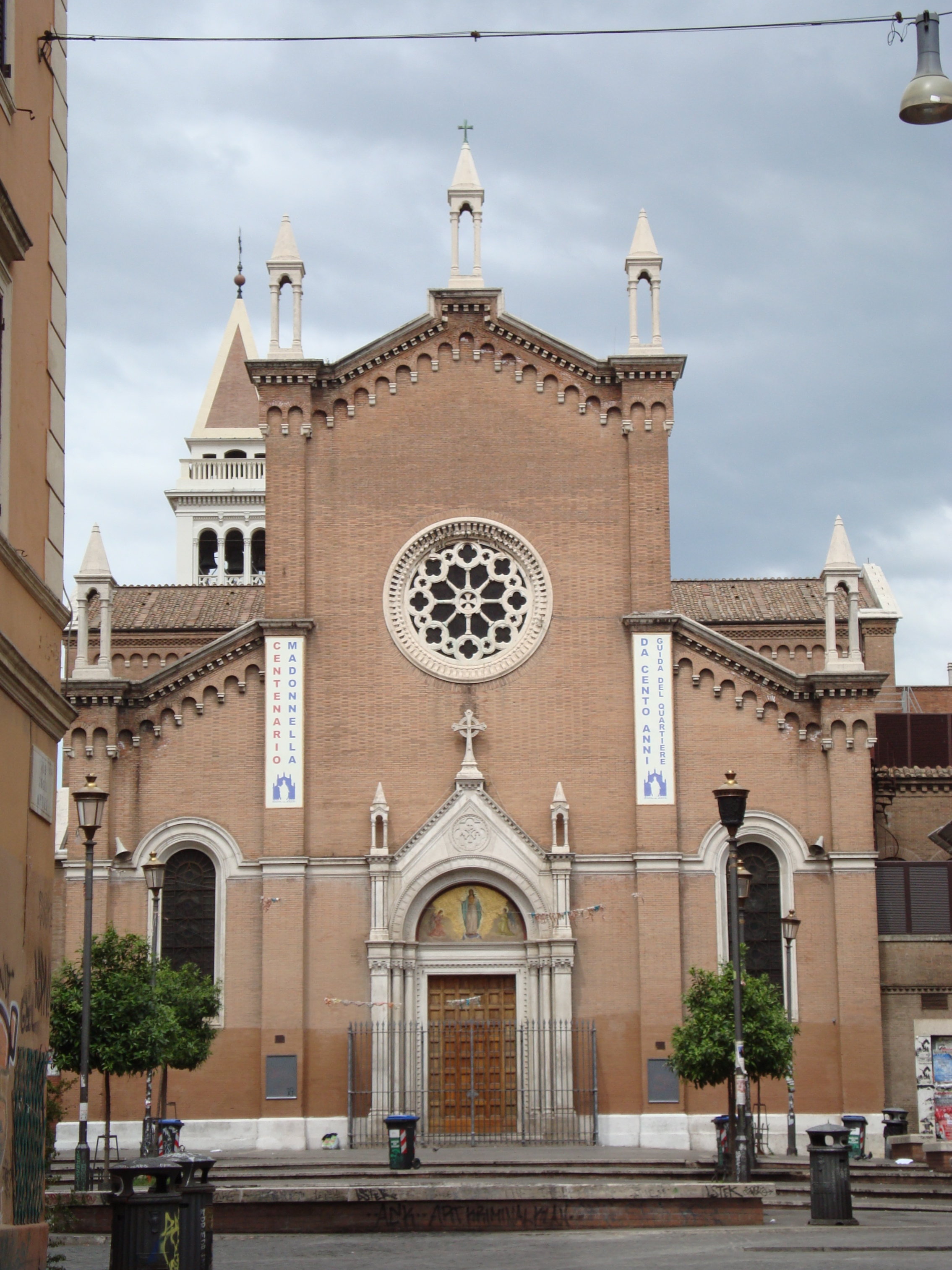 Eglise Santa Maria Immacolata a Rome dans le quartier Tiburtino